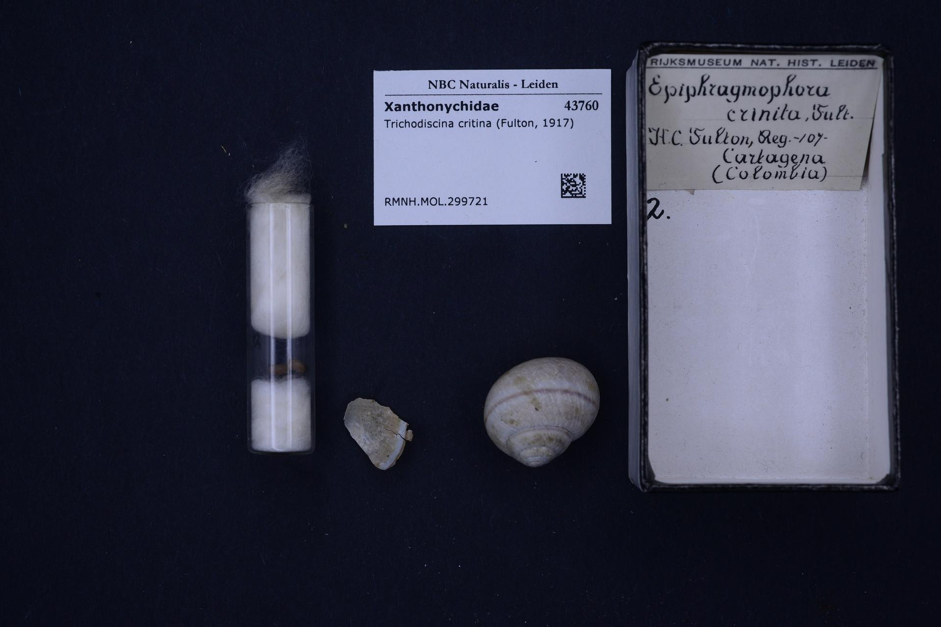 Trichodiscina critina (Fulton, 1917)